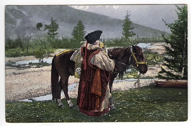 Женщина алтайка в национальном костюме (головной убор - куараан борук, овчинная шуба - тон, безрукавка - чегедек: одежда замужней женщины) с лошадью